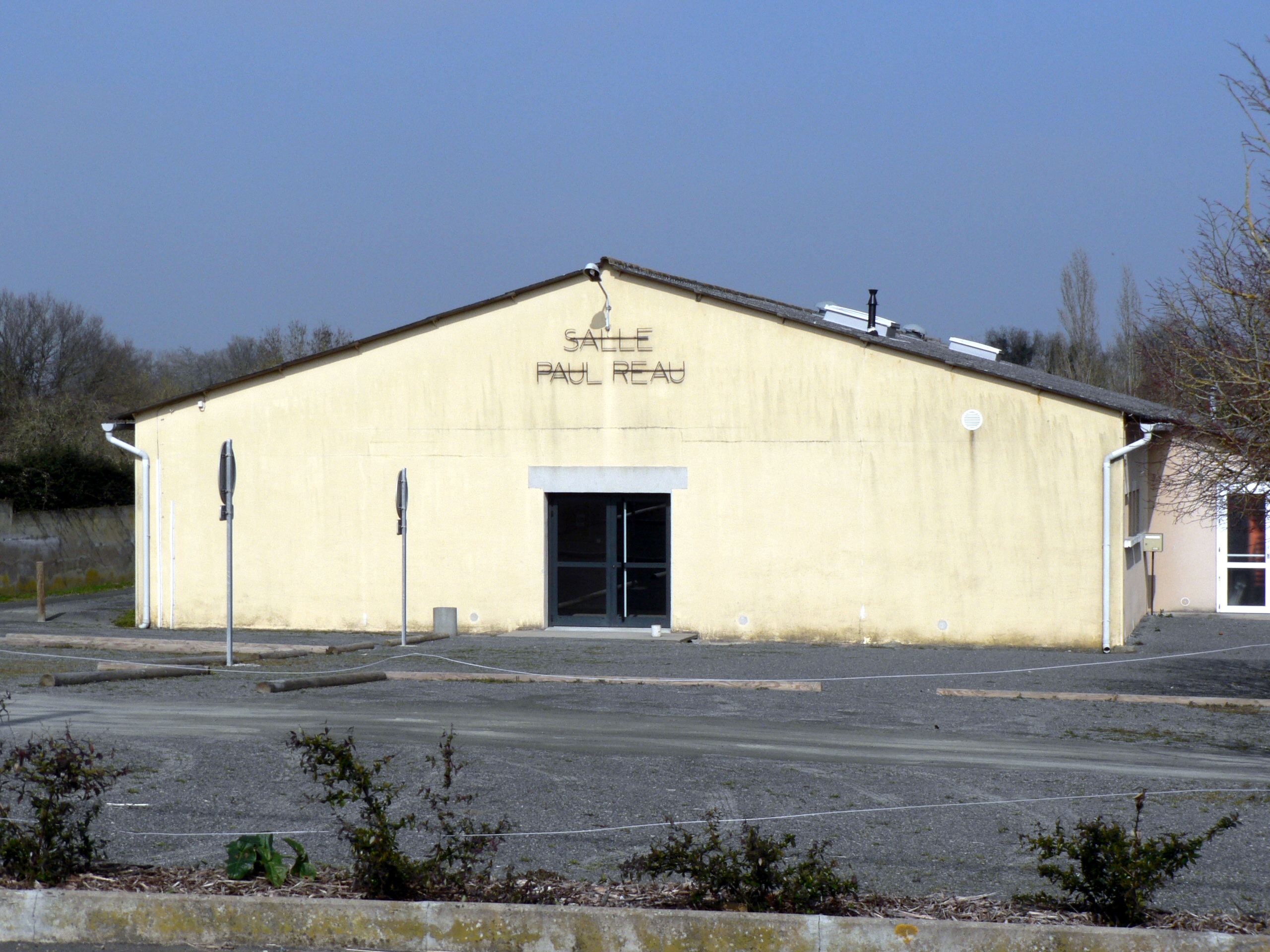 Vue de l'entrée de la salle communale Paul Réau de Glénay Deux Sèvres